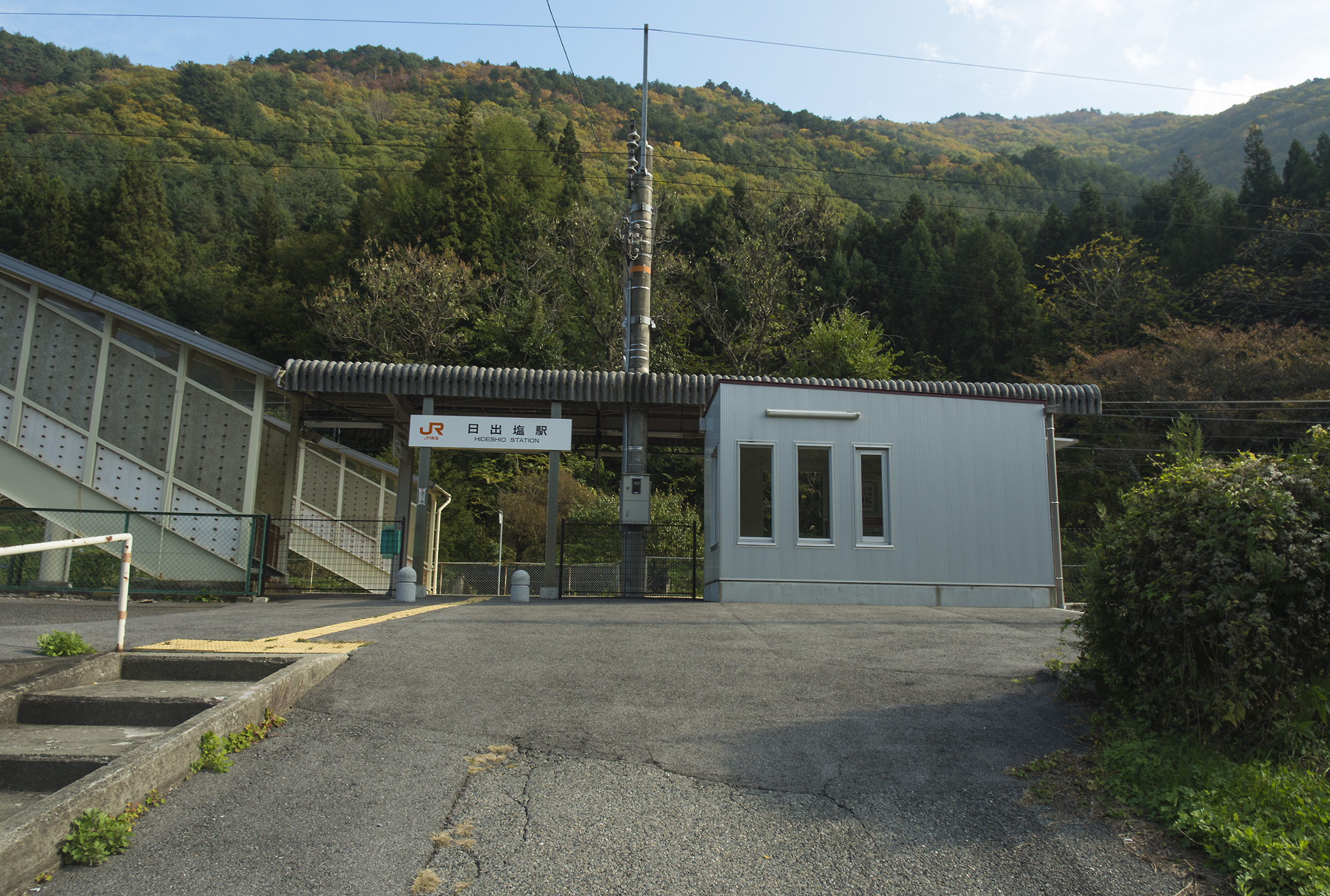 東海旅客鉄道株式会社中央本線日出塩駅